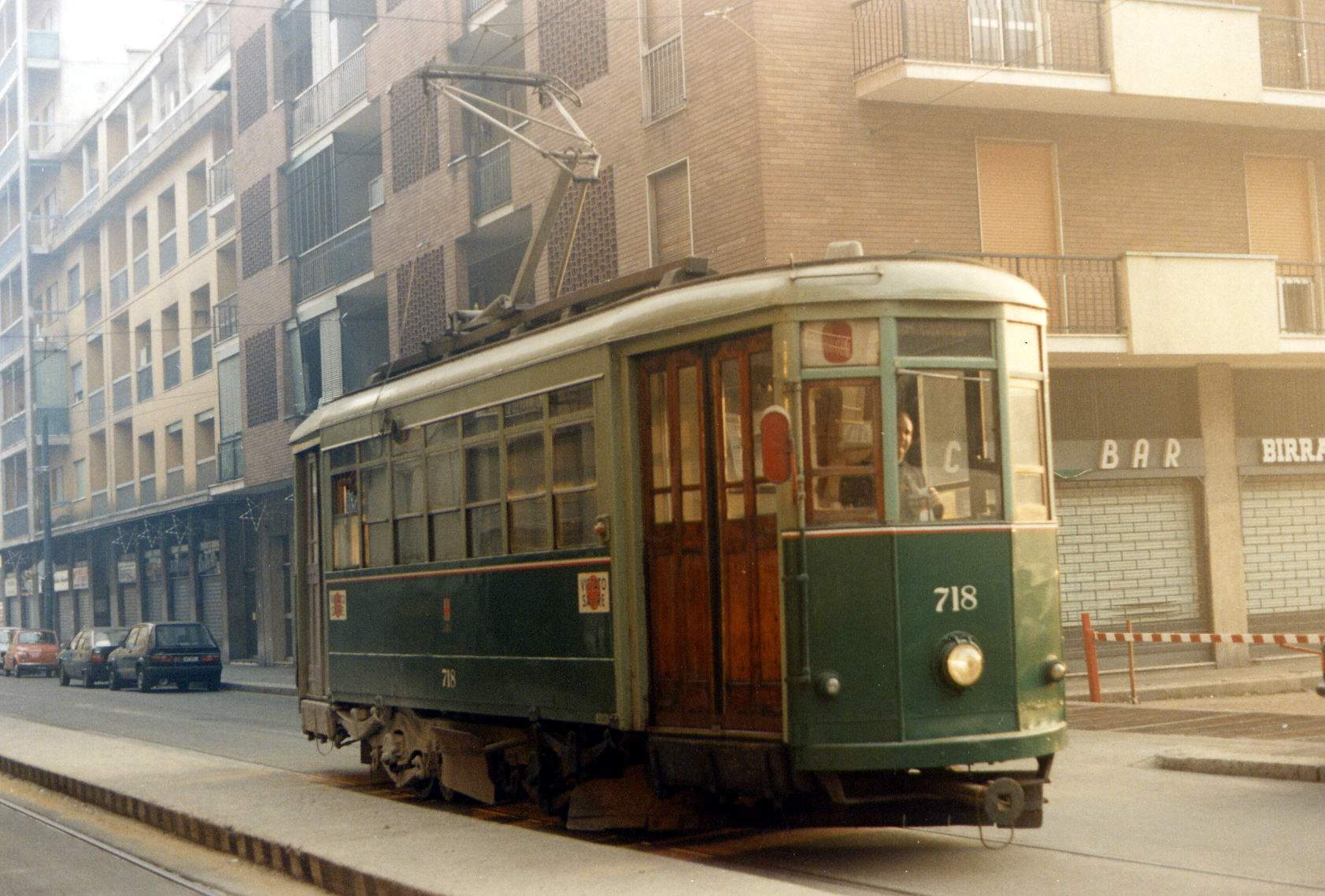 Vettura di servizio n° 718 dell'ATM di Milano